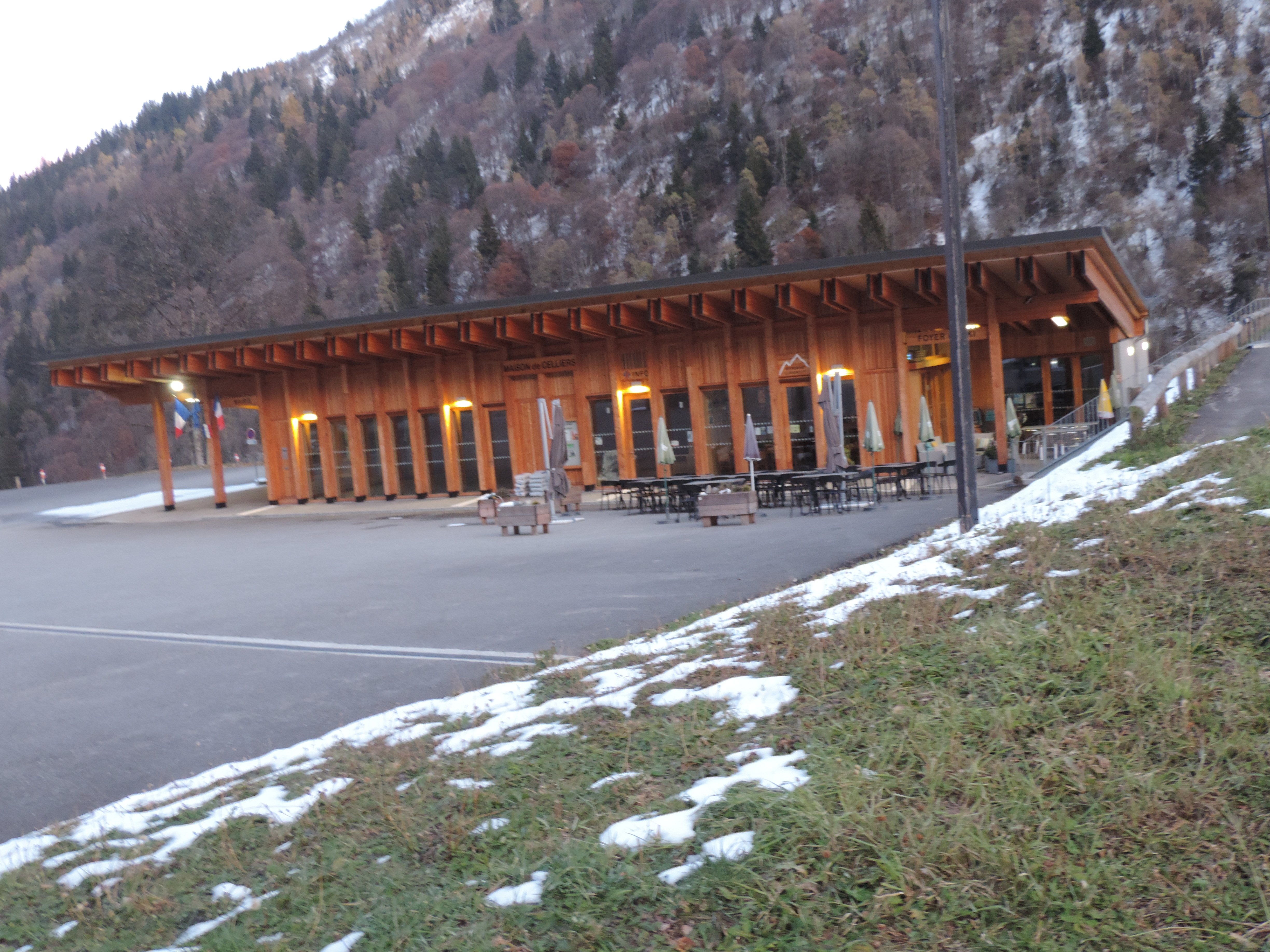 remontée mécanique celliers